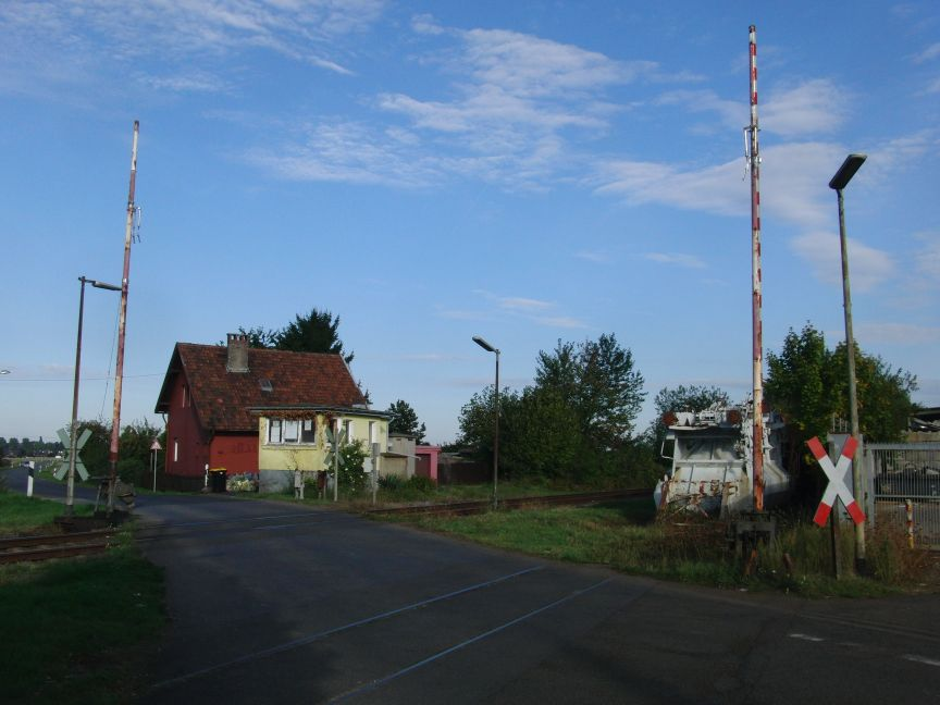 Bahnübergang Brückenstraße der Bördebahn, im Vordergrund das ehemalige Streckengleis der Bahnstrecke Düren - Distelrath